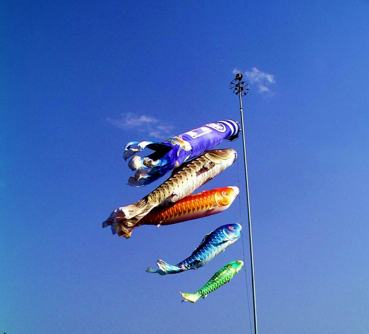 Koinobori